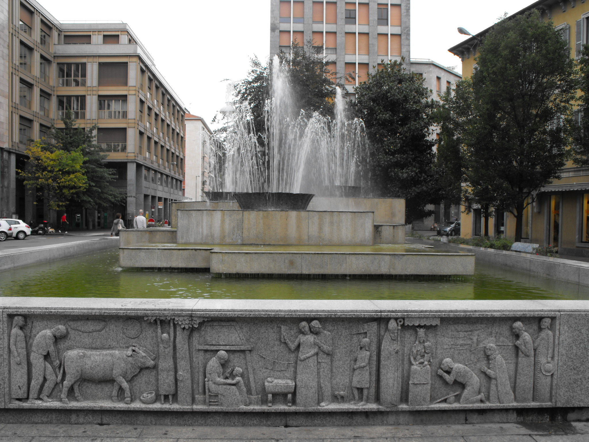 Fontana di piazza Garibaldi This is a photo of a monument which is part of cultural heritage of Italy.